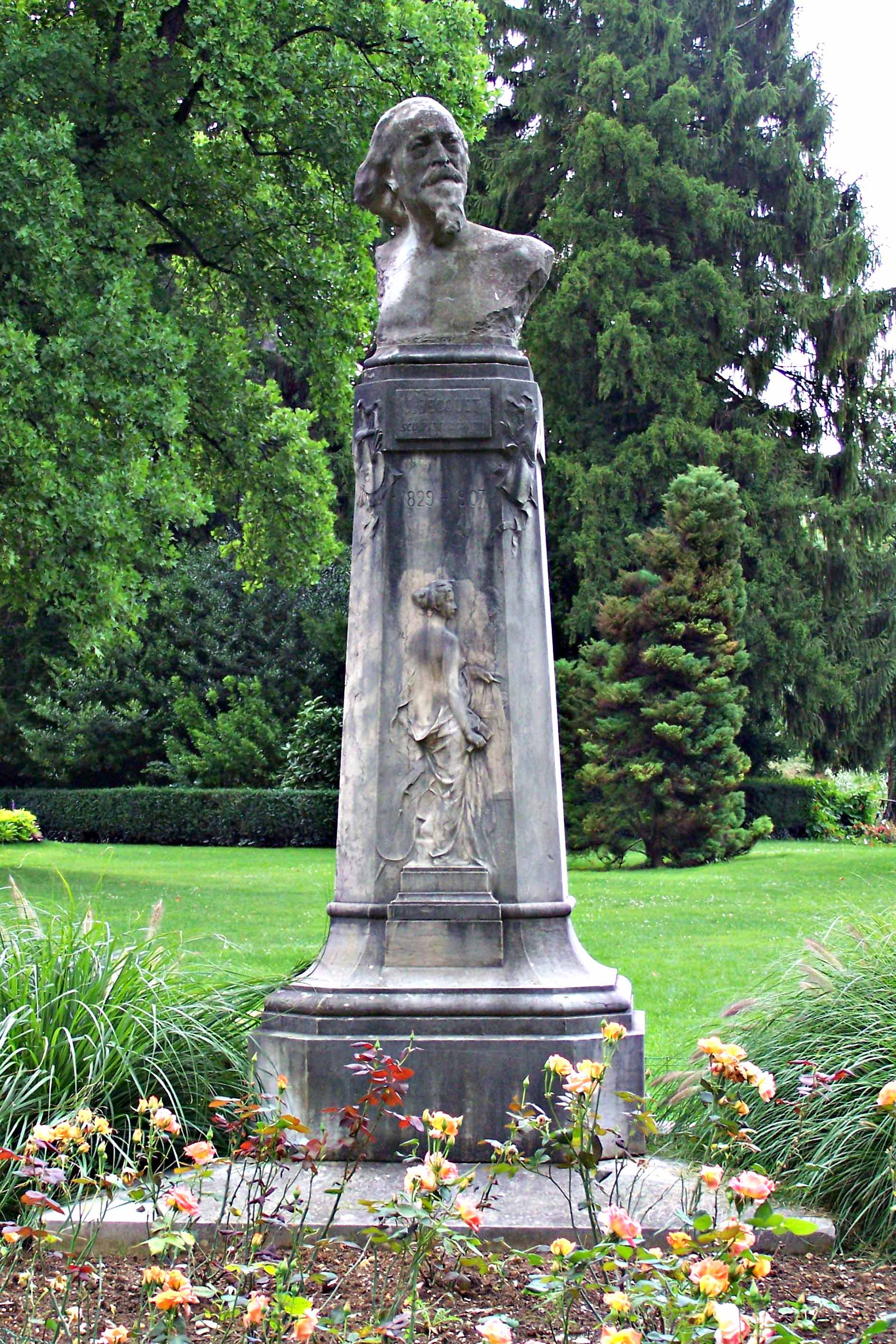 BESANÇON - Buste de Just Becquet - Promenade Micaud